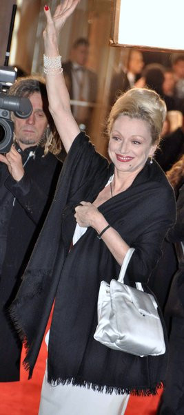 Caroline Silhol à la cérémonie des Césars 2010.